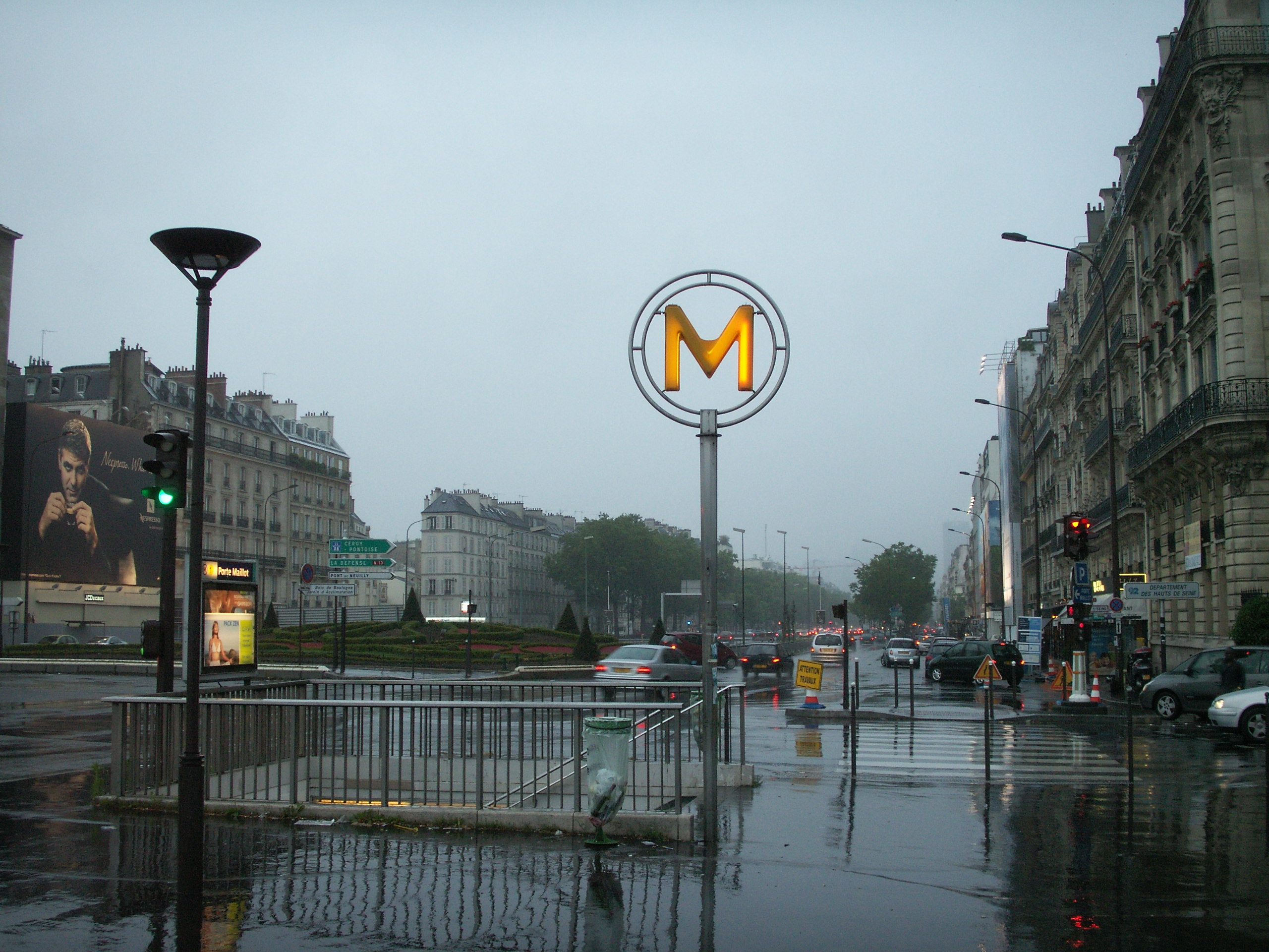 Une entrée de la station Porte Maillot